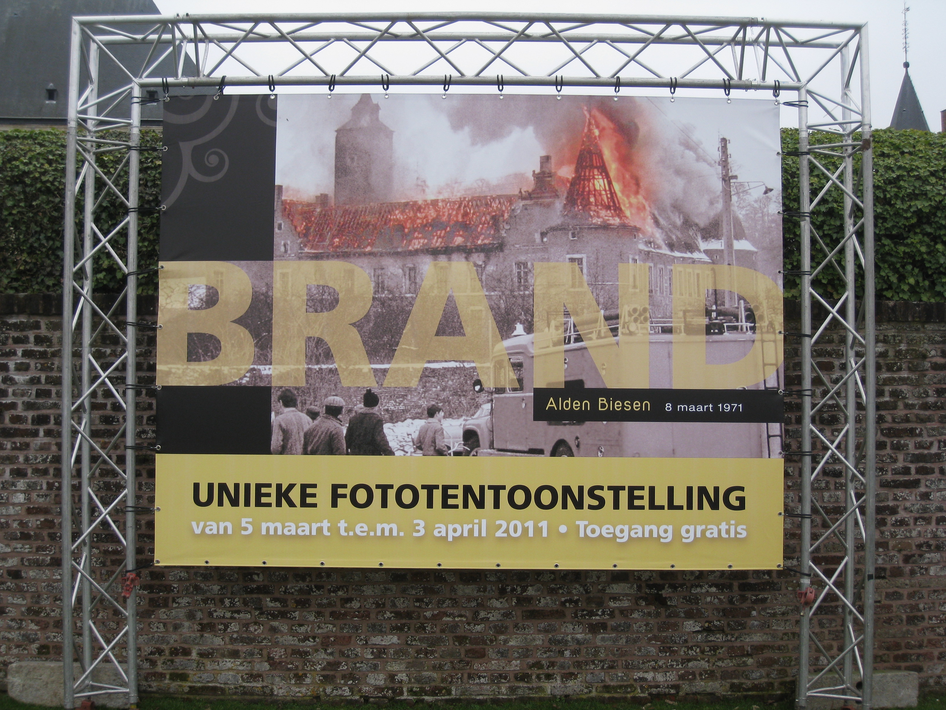 Tentoonstelling brand Alden Biesen 1971